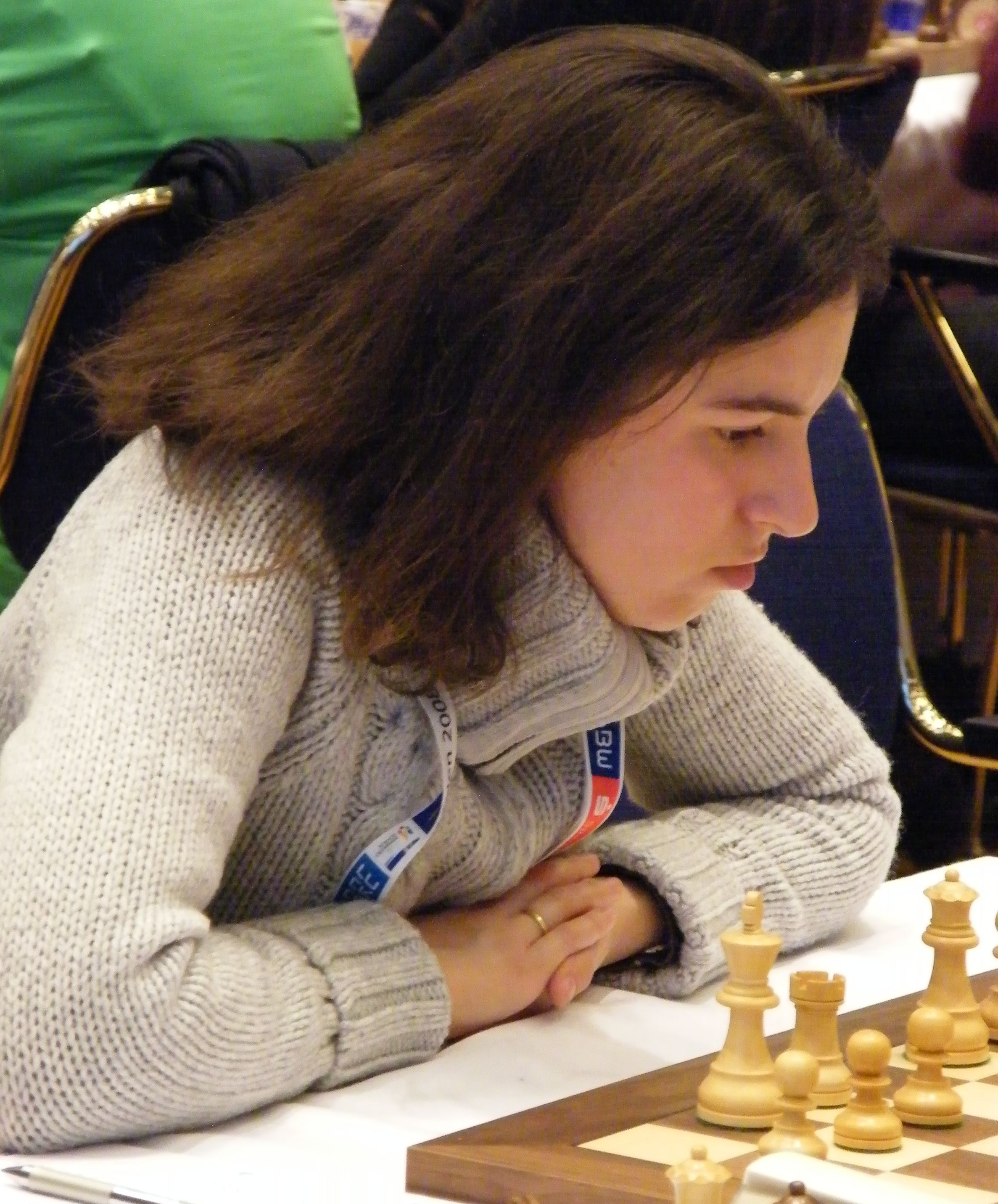 Jelena Dembo bei der 38. Schacholympiade in Dresden 2008